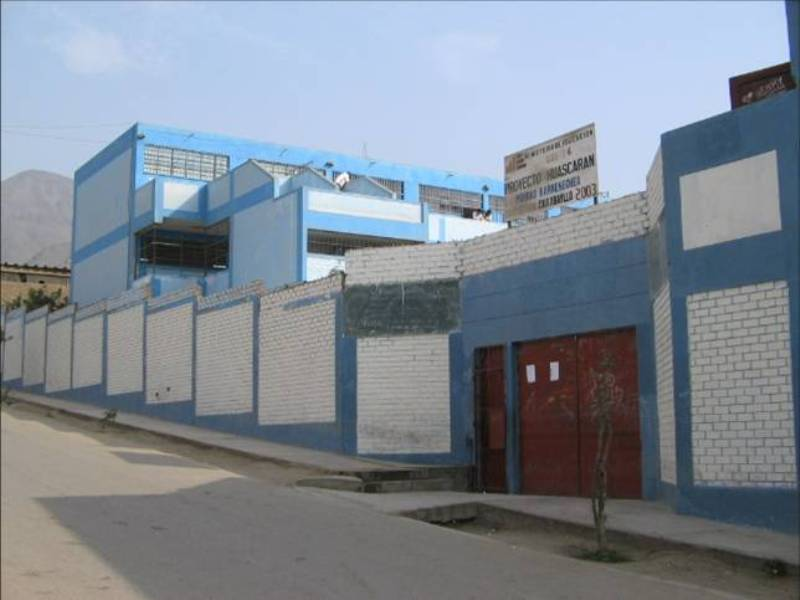 Frontis de la Institución Educativa Raúl Porras Barrenechea, en el Jr. Lima s/n cuadra 4 PP.JJ. Raúl Porras Barrenechea, Carabayllo